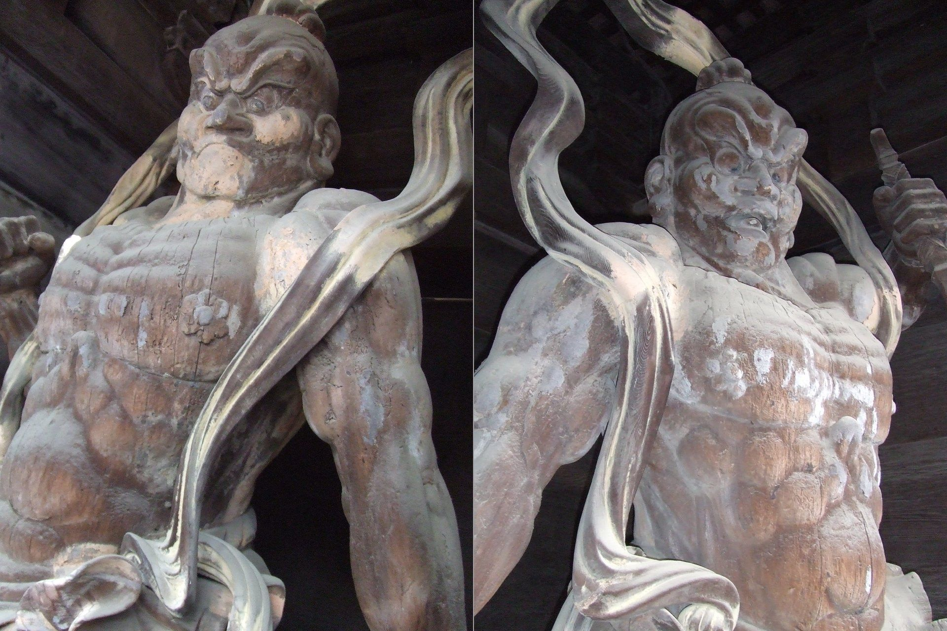 石手寺の仁王像